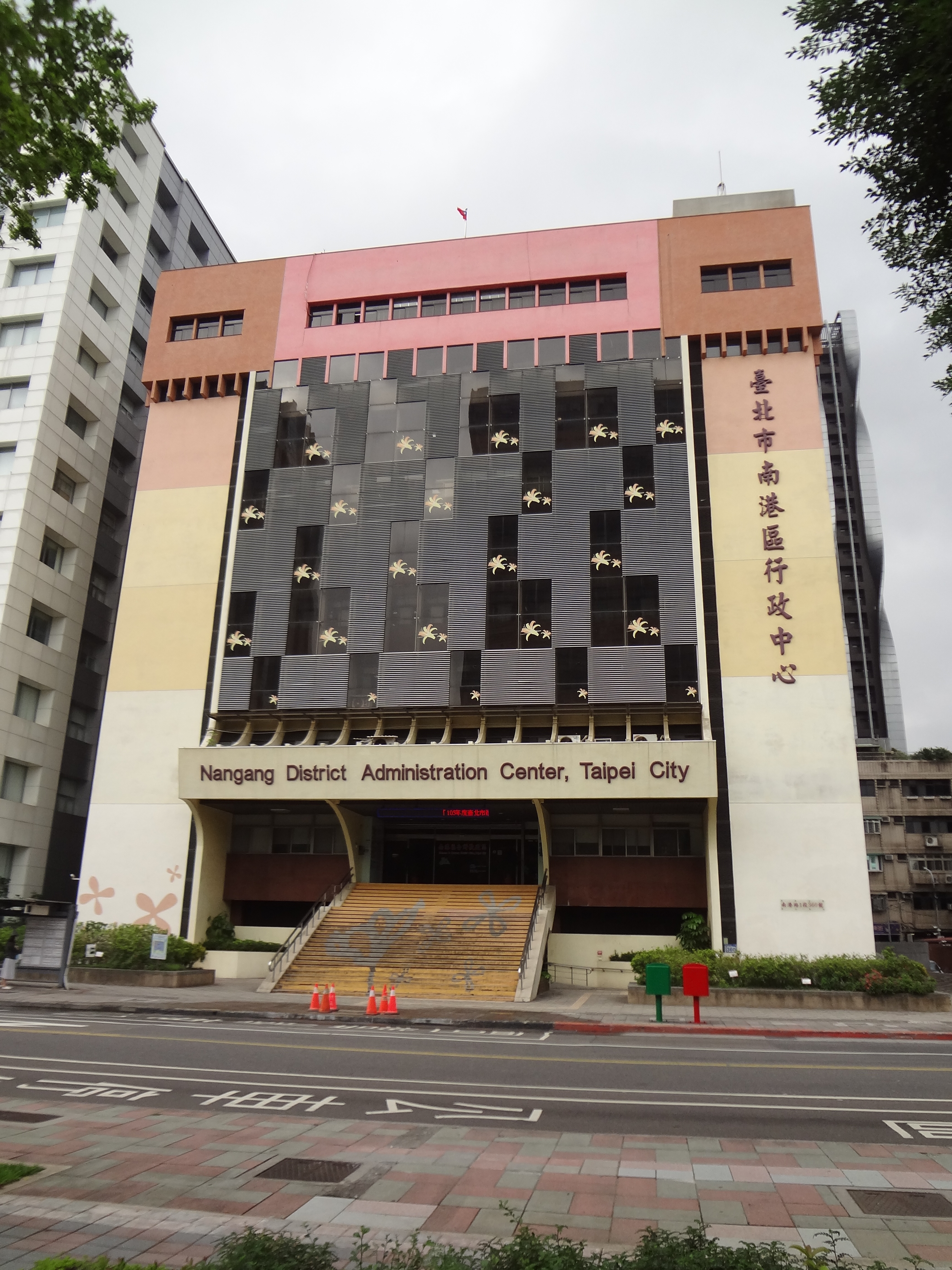 中文（台灣）: 臺北市南港區行政中心，位於臺北市南港區南港路一段360號。